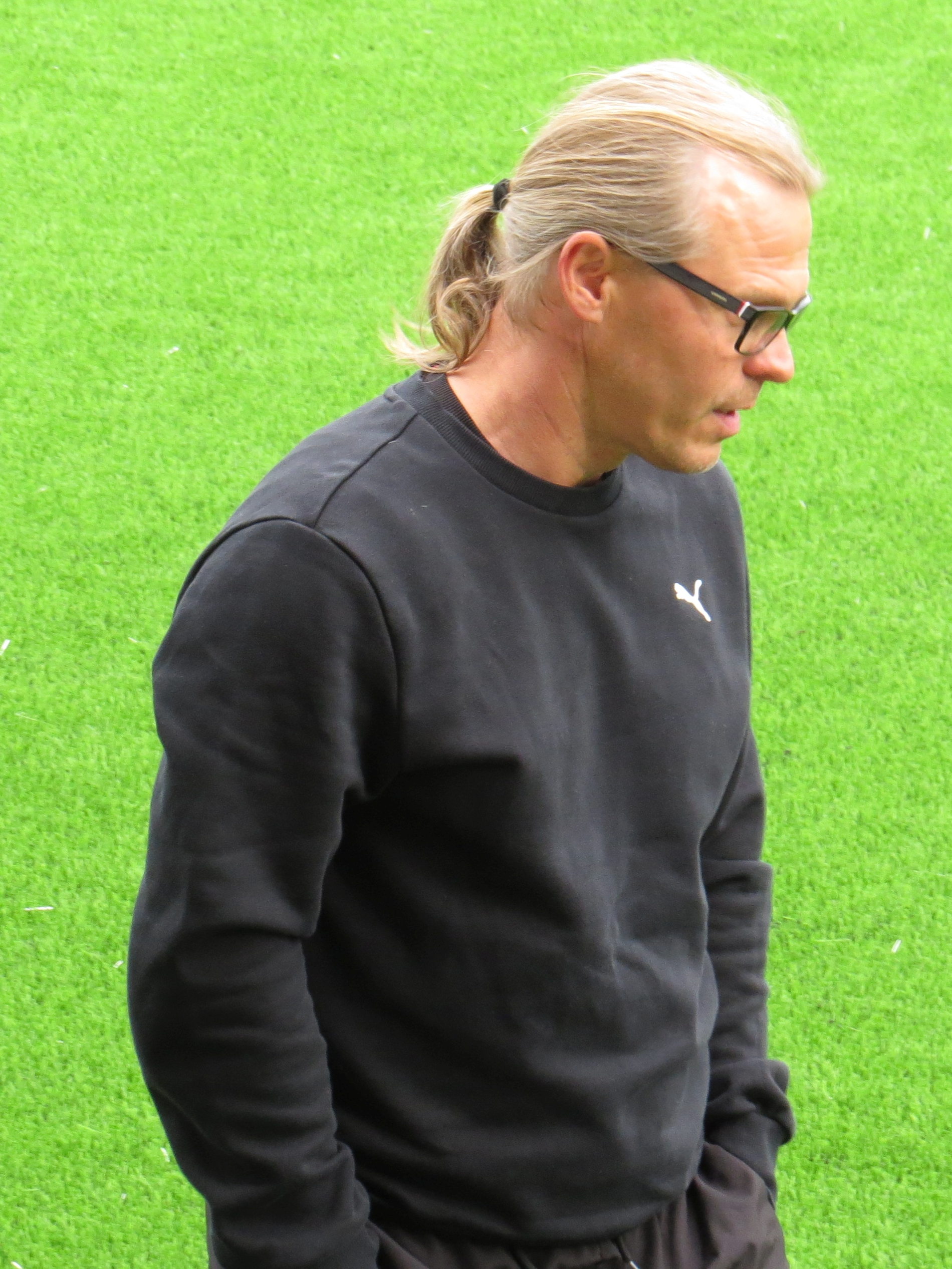 Marko Rajamäki, suomalainen entinen jalkapalloilija ja nykyinen jalkapallovalmentaja Kuopion Palloseuran valmentajana kaudella 2015.